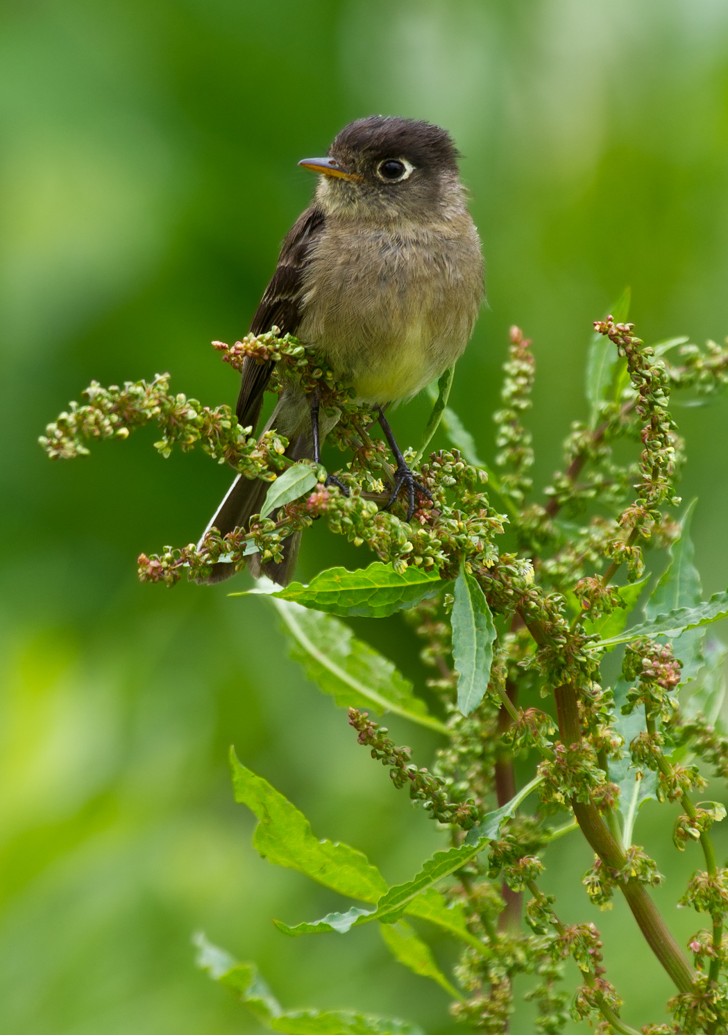 Endemic from Costa Rica and Panama, Cerro de la Muerte, Costa Rica